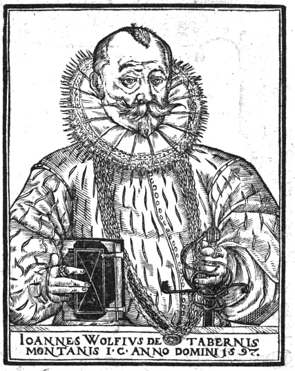 Johannes Wolf/Wollf aus Bergzabern (1537-1600)